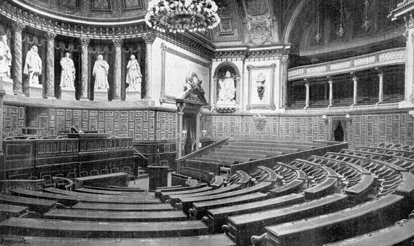 La salle des séances de la Haute Cour en 1899 pour le procès de l'affaire Déroulède. Pour adapter hémicycle, la tribune est enlevée, des barres sont installées. Lors de ce procès, le nombre des accusés - quinze - exige des arrangements complémentaires : La partie gauche de l'hémicycle est vidée de ses fauteuils et dotée de chaises rivées au sol pour qu'y soient installés les prévenus, ainsi placés derrière leurs avocats, auxquels est réservé le banc des ministres. Une barrière sépare les prévenus des témoins, assis derrière eux.